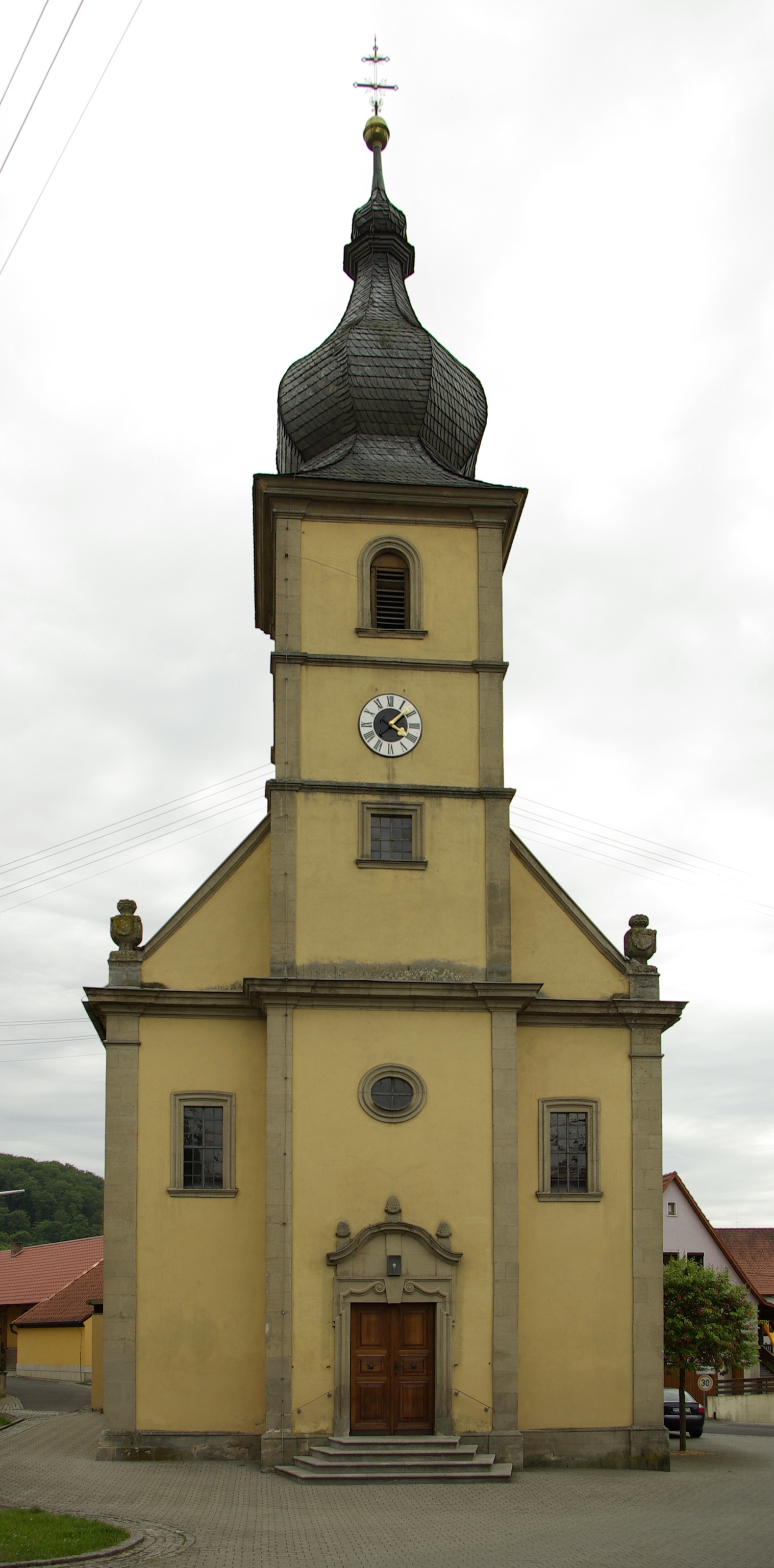 Die katholische Pfarrkirche St. Martin in Geusfeld in der Gemeinde Rauhenebrach